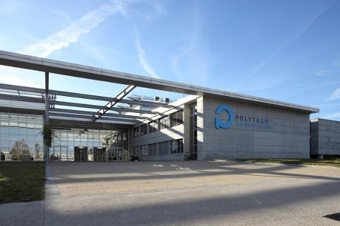 Vue de Polytech Clermont-Ferrand coté tram et IUT